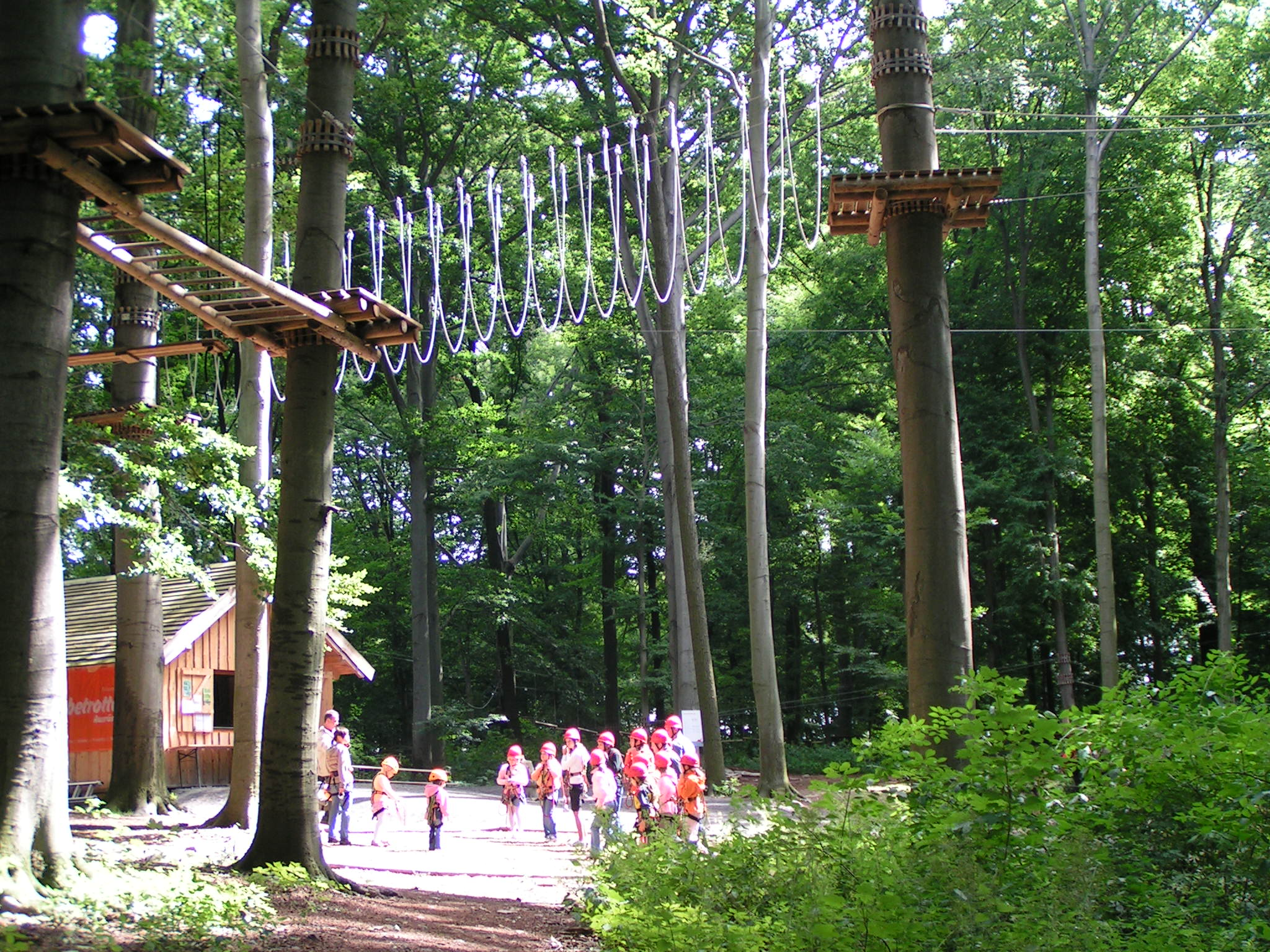 Hochsilgarten im Wildgehege Moritzburg